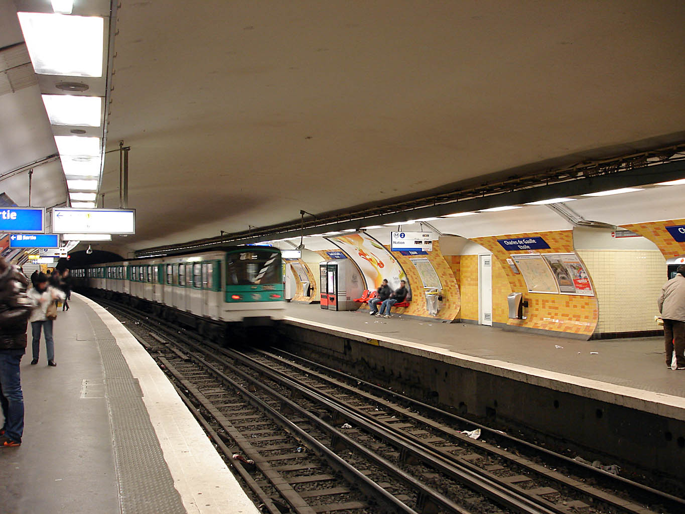 Station Charles de Gaulle - Étoile de la ligne 2 du métro de Paris, France.